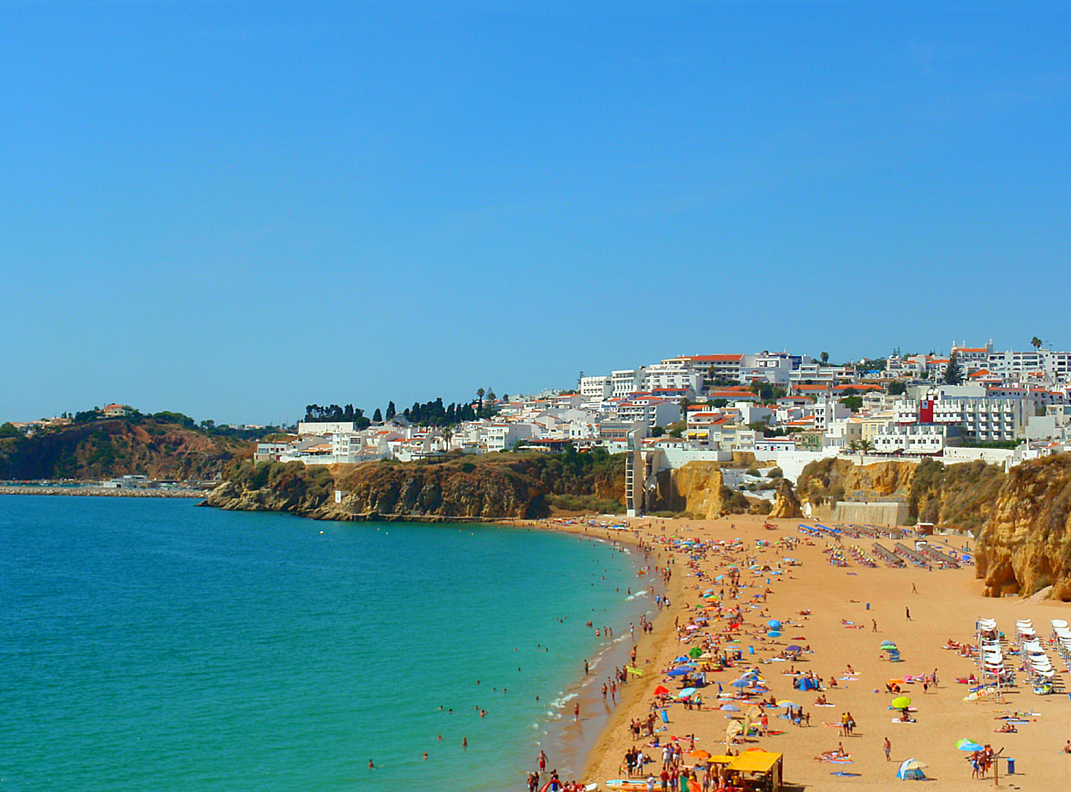 Albufeira (Portugal)